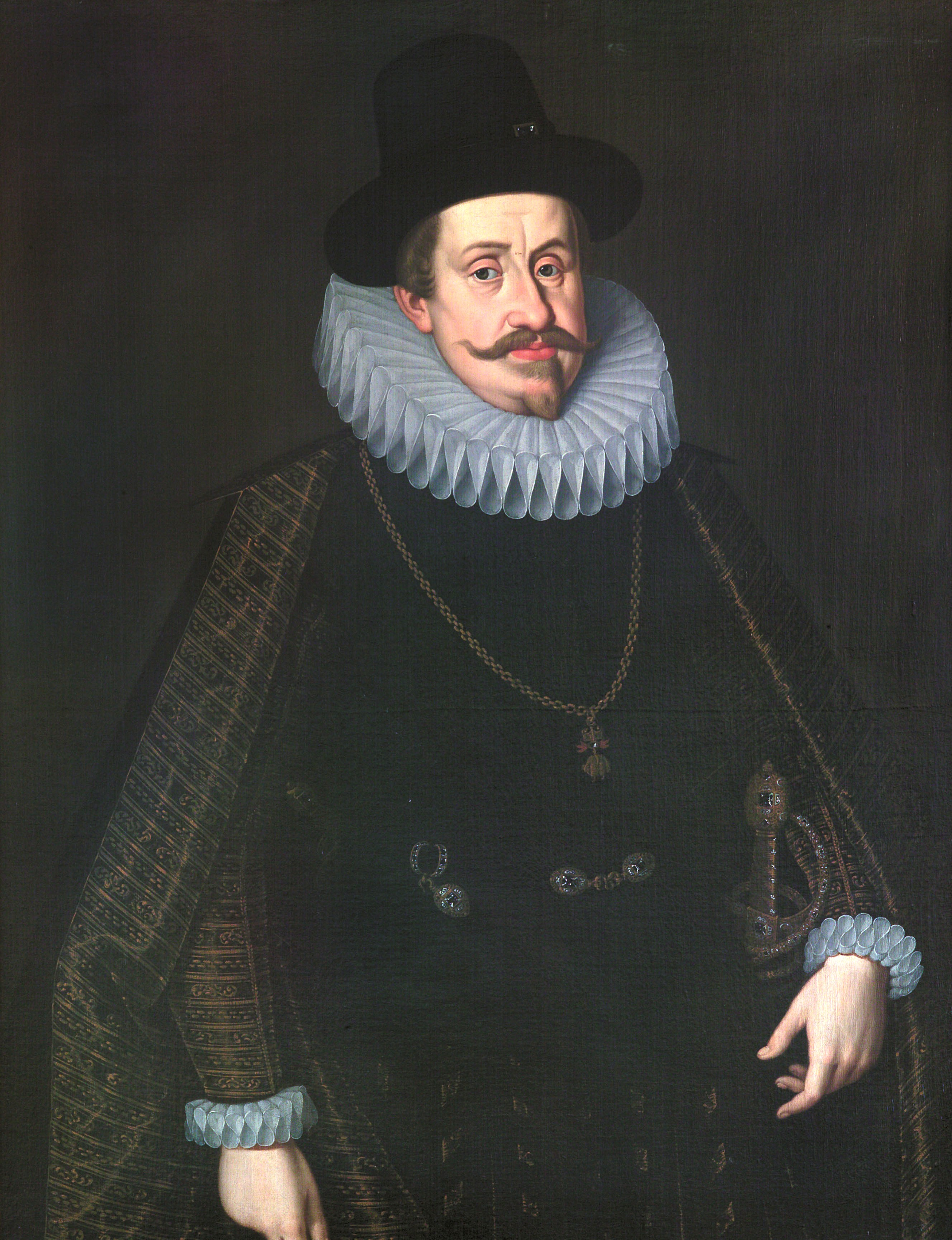 Ritratto di Vincenzo I Gonzaga